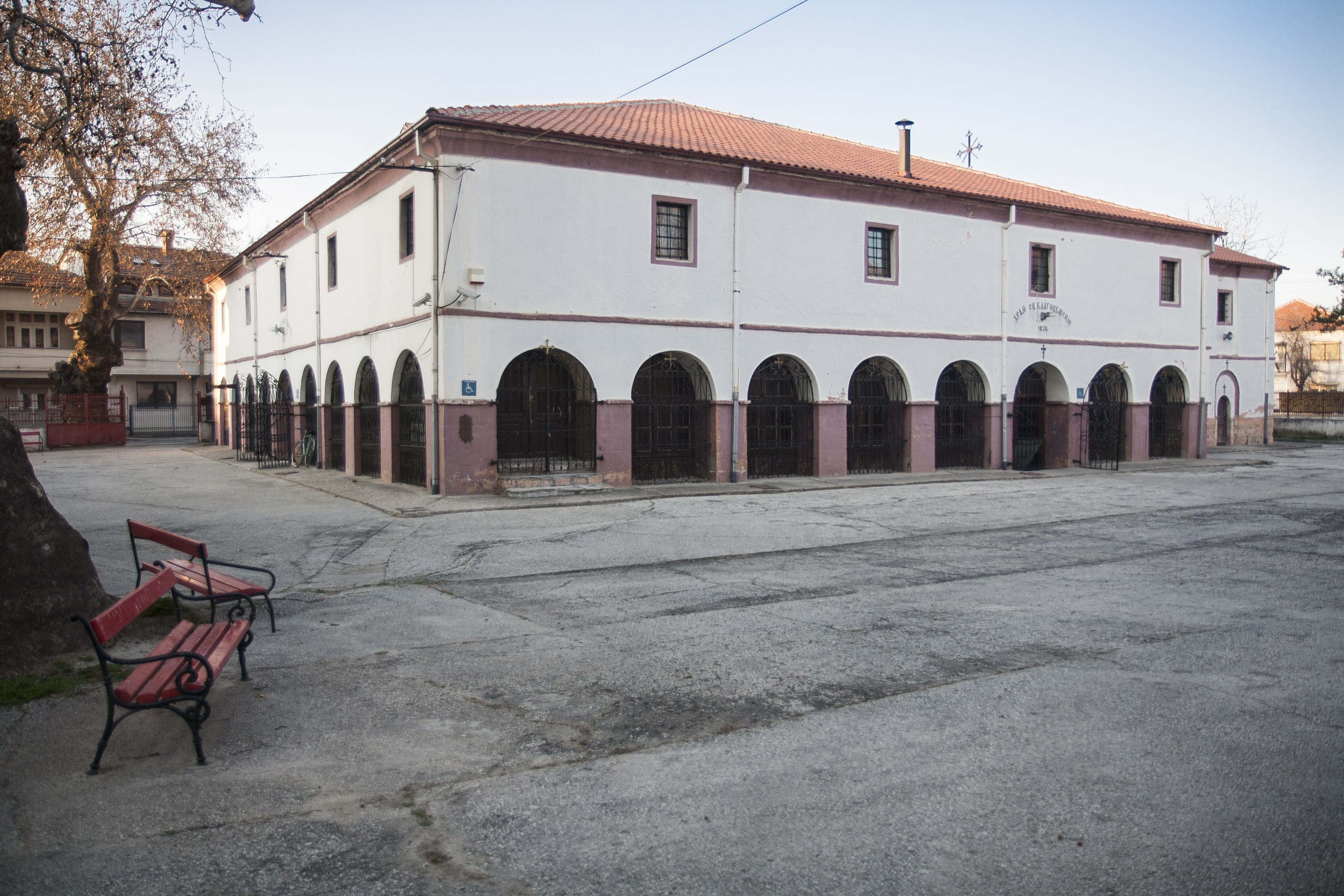 Црква “Благовештение“